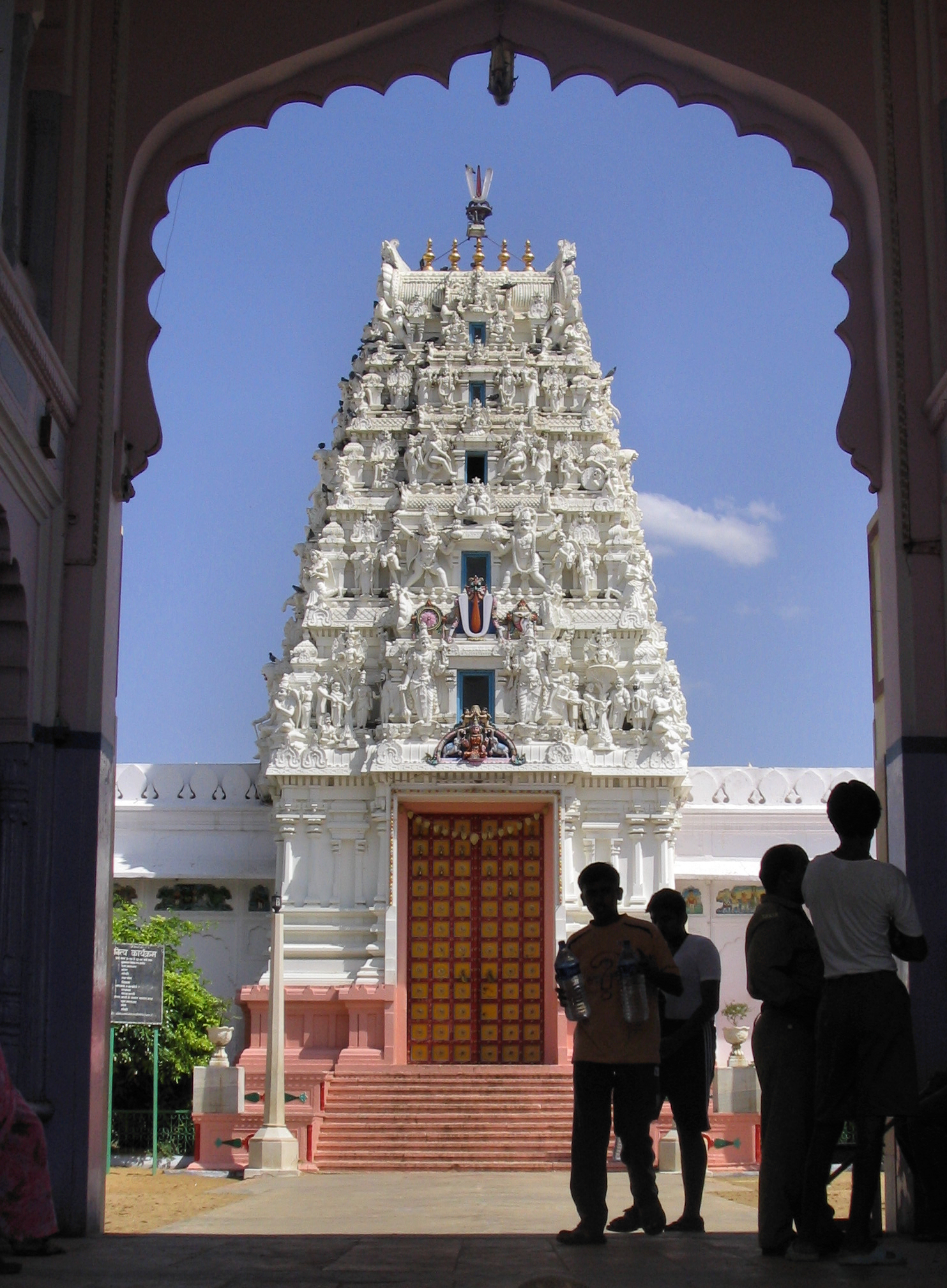 Puskhar Hindu Temple